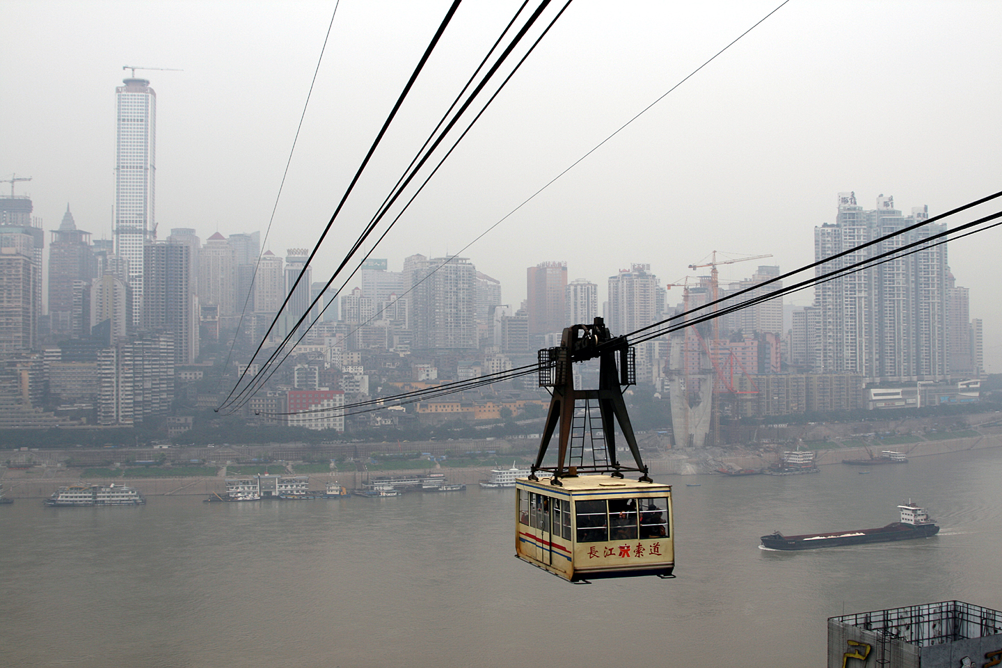 重庆长江索道